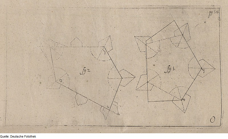 Original image description from the Deutsche Fotothek Geometrie & Festungsbau